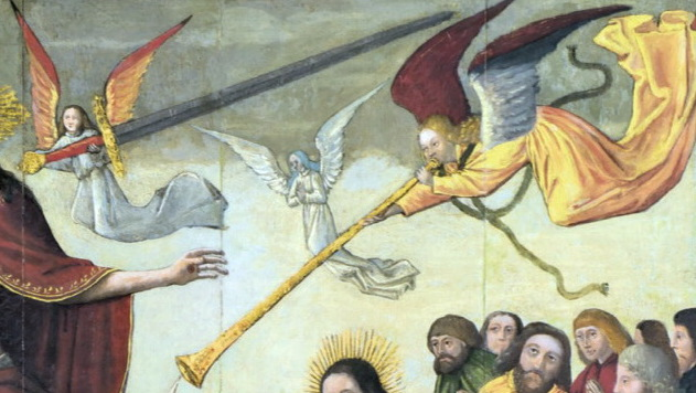 Detail van het Gerechtigheidspaneel of De dubbele gerechtigheid (Jan van Brussel, ca. 1475), voorheen in het Stadhuis van Maastricht, sinds 2018 in het Bonnefantenmuseum. Hier een detail van het bovenste deel van de lijst met daarop het jaartal 1599 (waarschijnlijk van een restauratie) en tweemaal de Maastrichter stadsster.